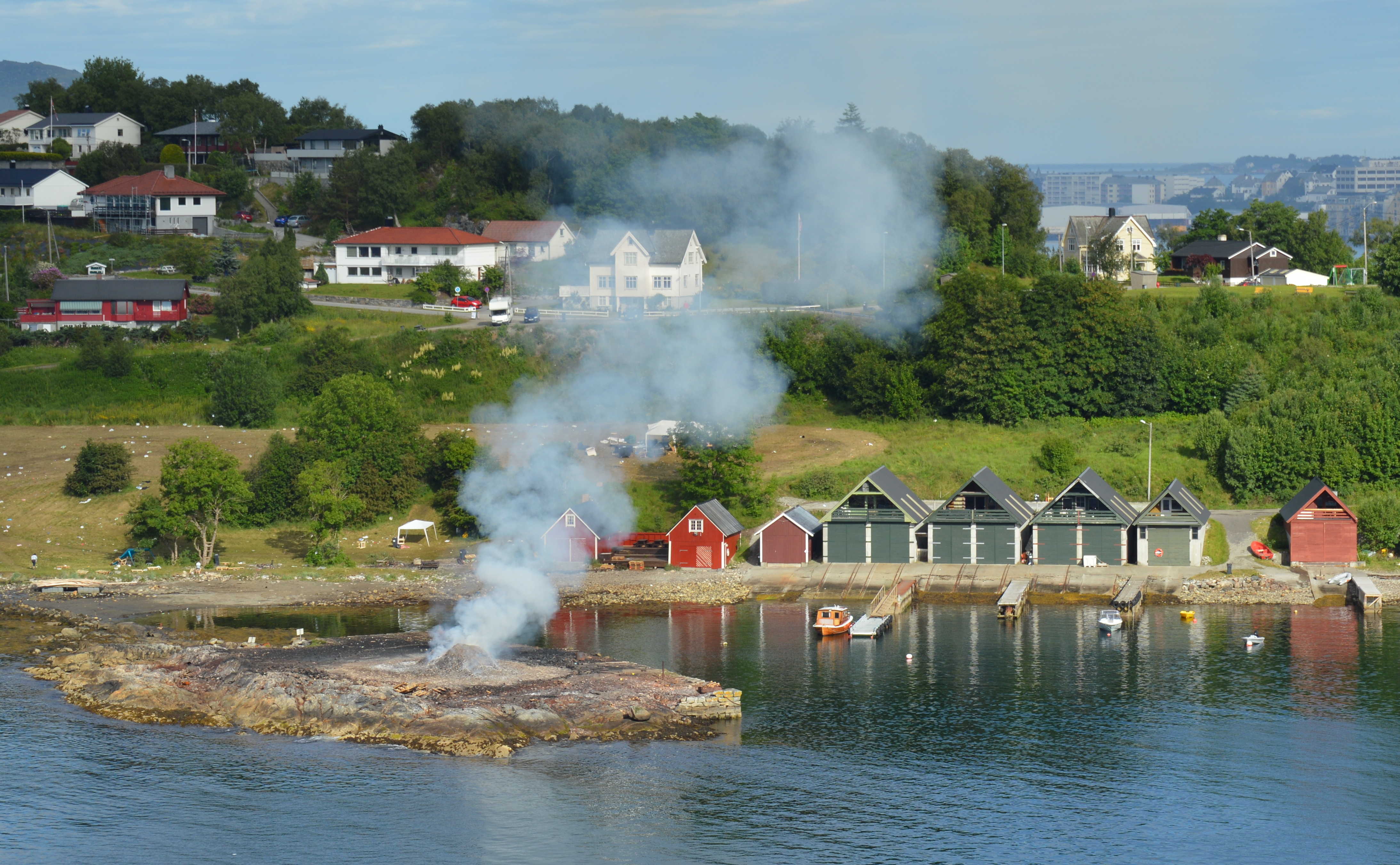 Reste des Feuers zum Johannestag in Alesund 2017